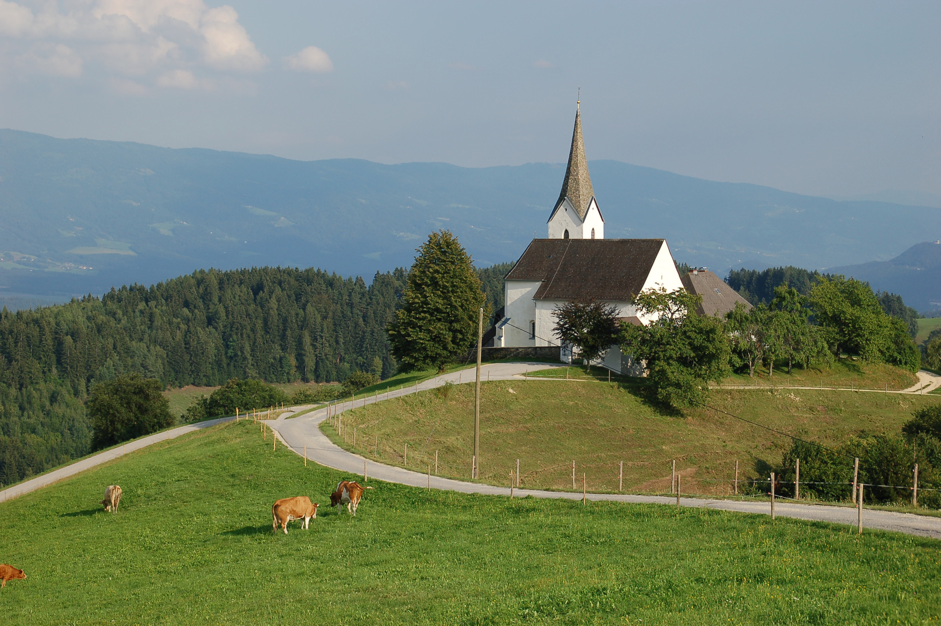 Kath. Pfarrkirche hl. Georg und Friedhof